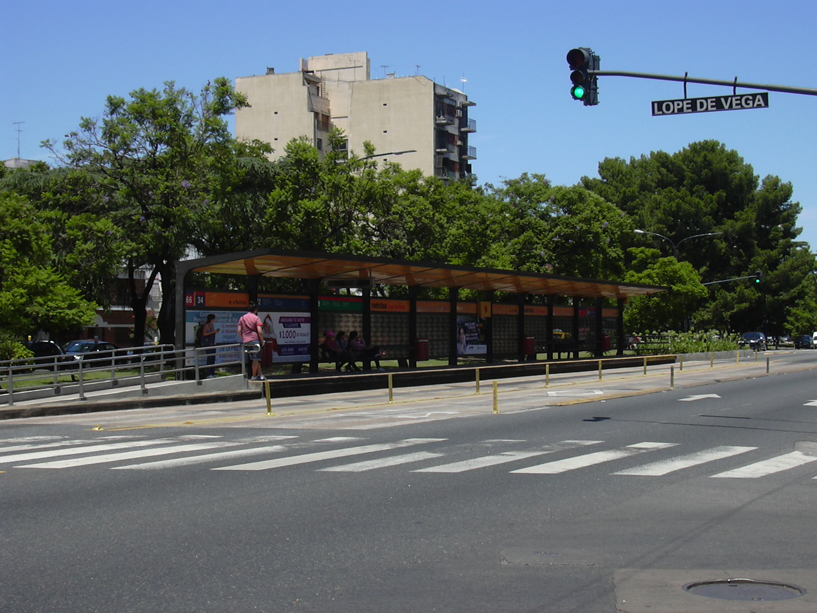 Estación Lope de Vega del Metrobús de Buenos Aires vista desde el este